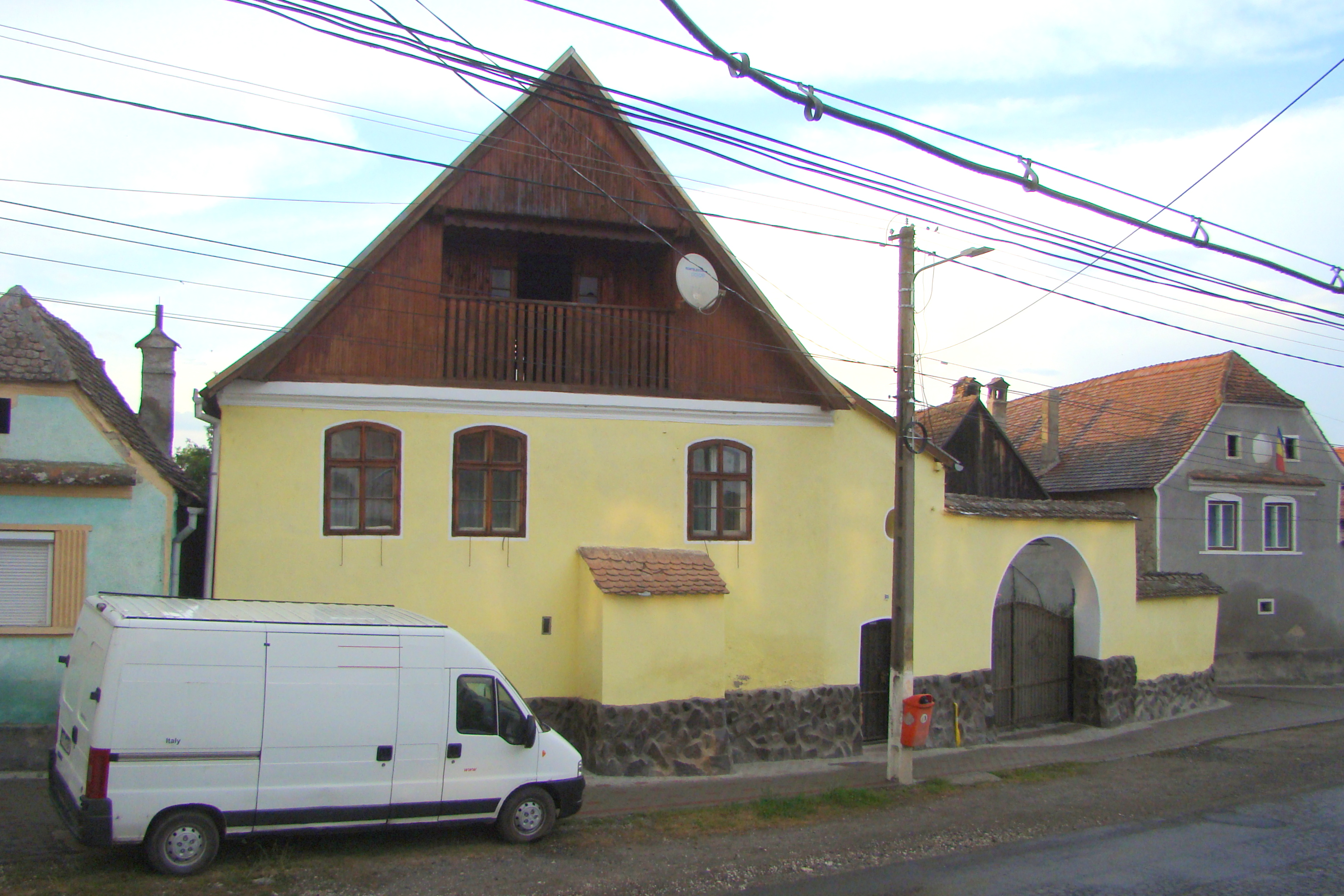 Casă, sat Homorod; comuna Homorod 285 sec. XVIII